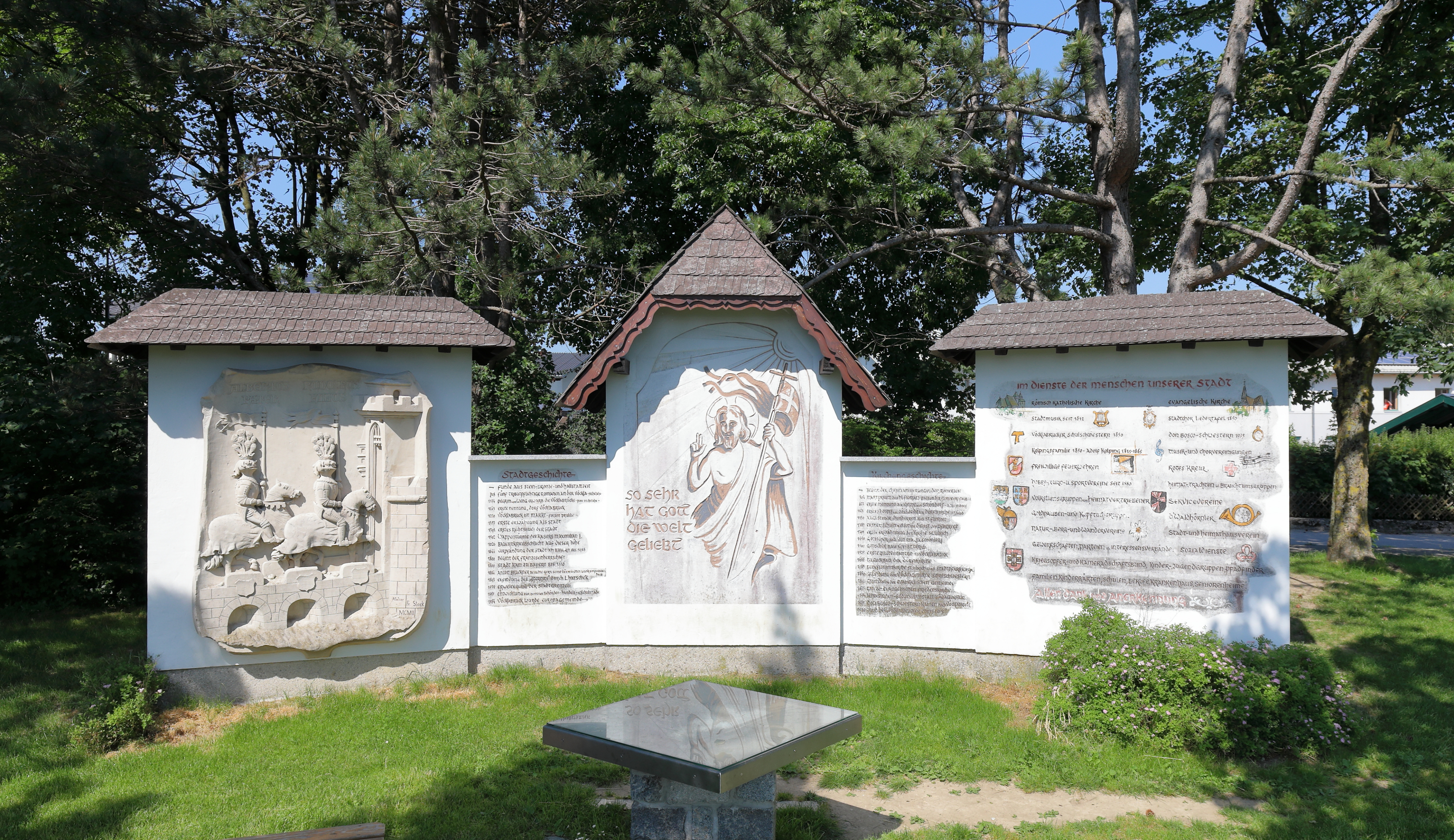 Denkmal nächst der Landwirtschaftsschule (gegenüber Höhenstraße 1) in der oberösterreichischen Stadtgemeinde Vöcklabruck. Das Denkmal entstand 1991 nach einer Idee von Franz Bucar, der es auch gestaltete.